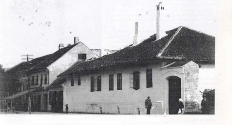 Бели Конак Куртовића